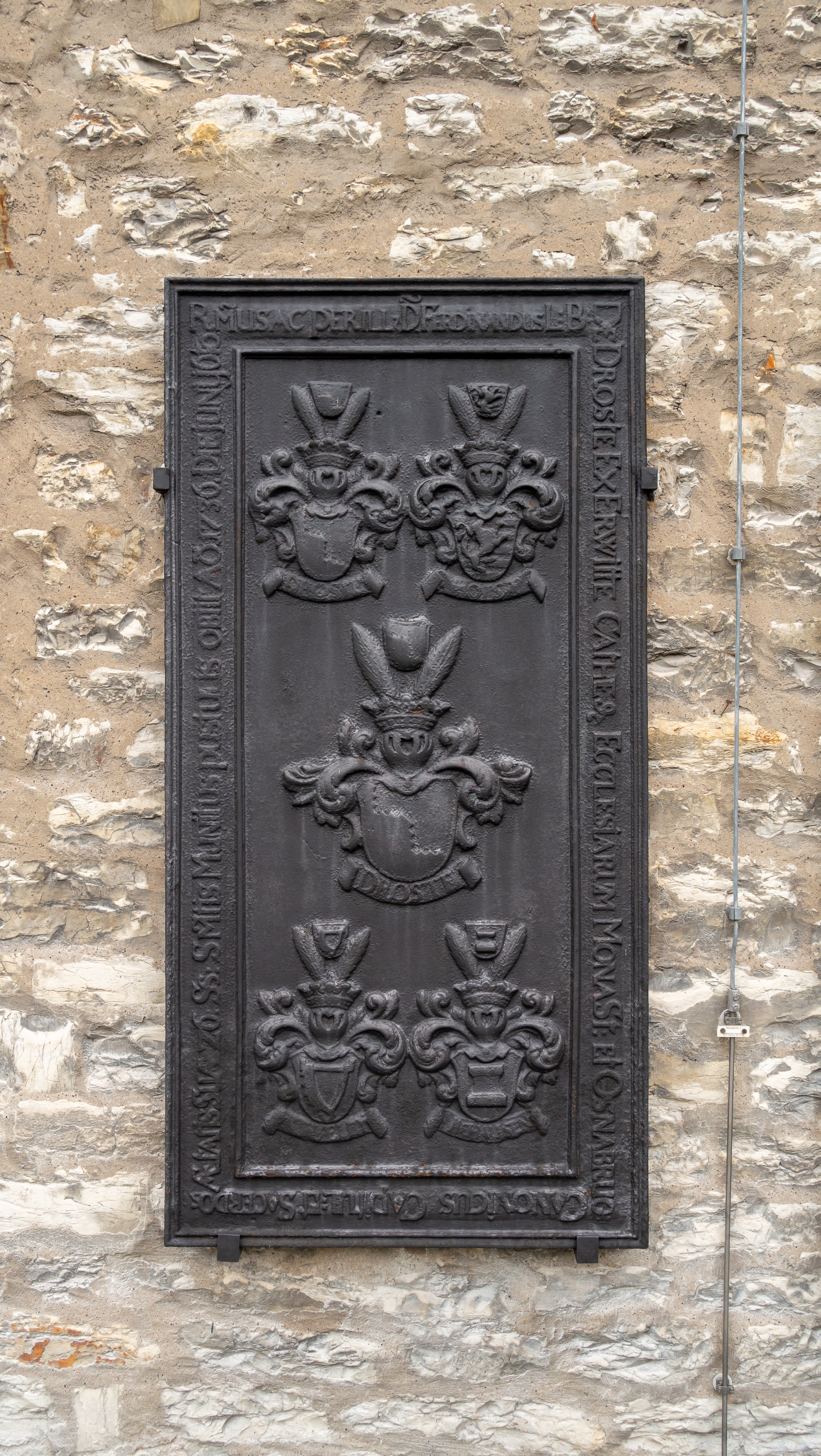 Eisenplatte an der Gaukirche in Paderborn; Grabplatte von Ferdinand Philipp Droste zu Erwitte, Domher in Münster und Osnabrück († 1736)